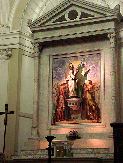 Interior da Catedral de Porto Alegre, Brasil. Altar-mor com imagem da Mãe de Deus, padroeira da cidade, contra pintura de Aldo Locatelli